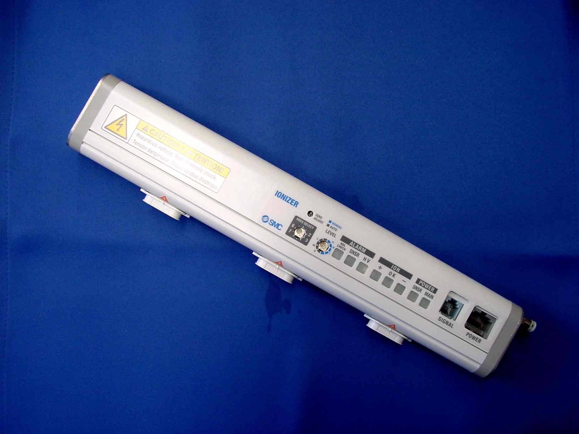 Ionizer